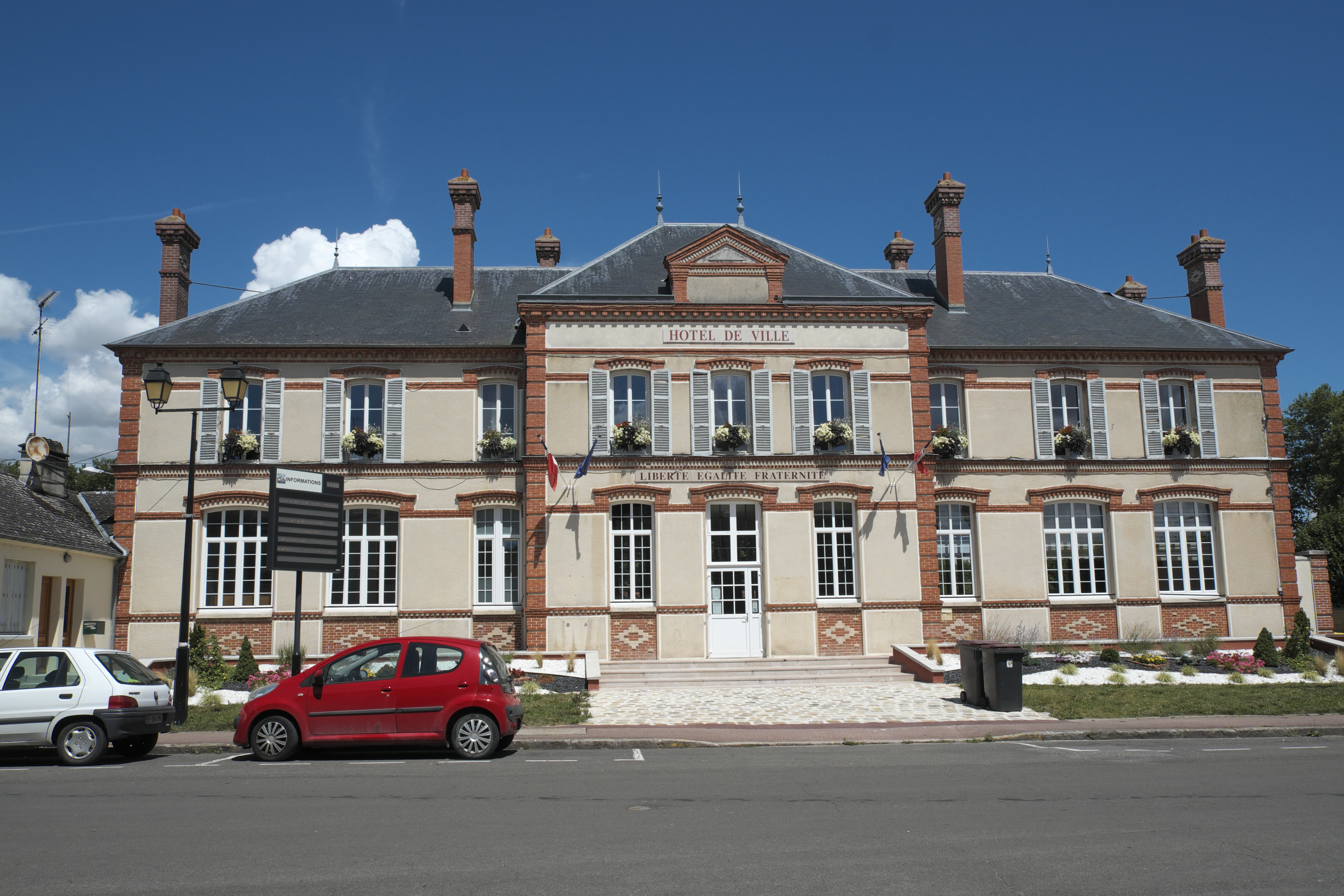 Rathaus (Hôtel de Ville) in Bray-sur-Seine im Département Seine-et-Marne (Île-de-France/Frankreich)